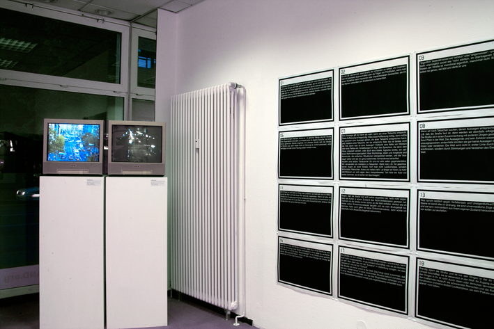 Hans-Peter Klie: Philosophie der Straße II. 2004. Multimedia-Installation